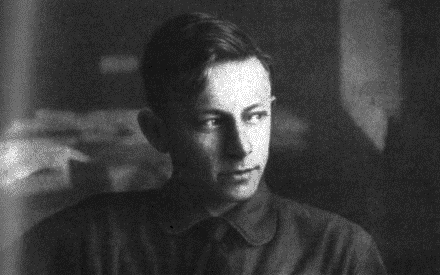 Виктор Павлович Кин (Суровикин). 1930-е